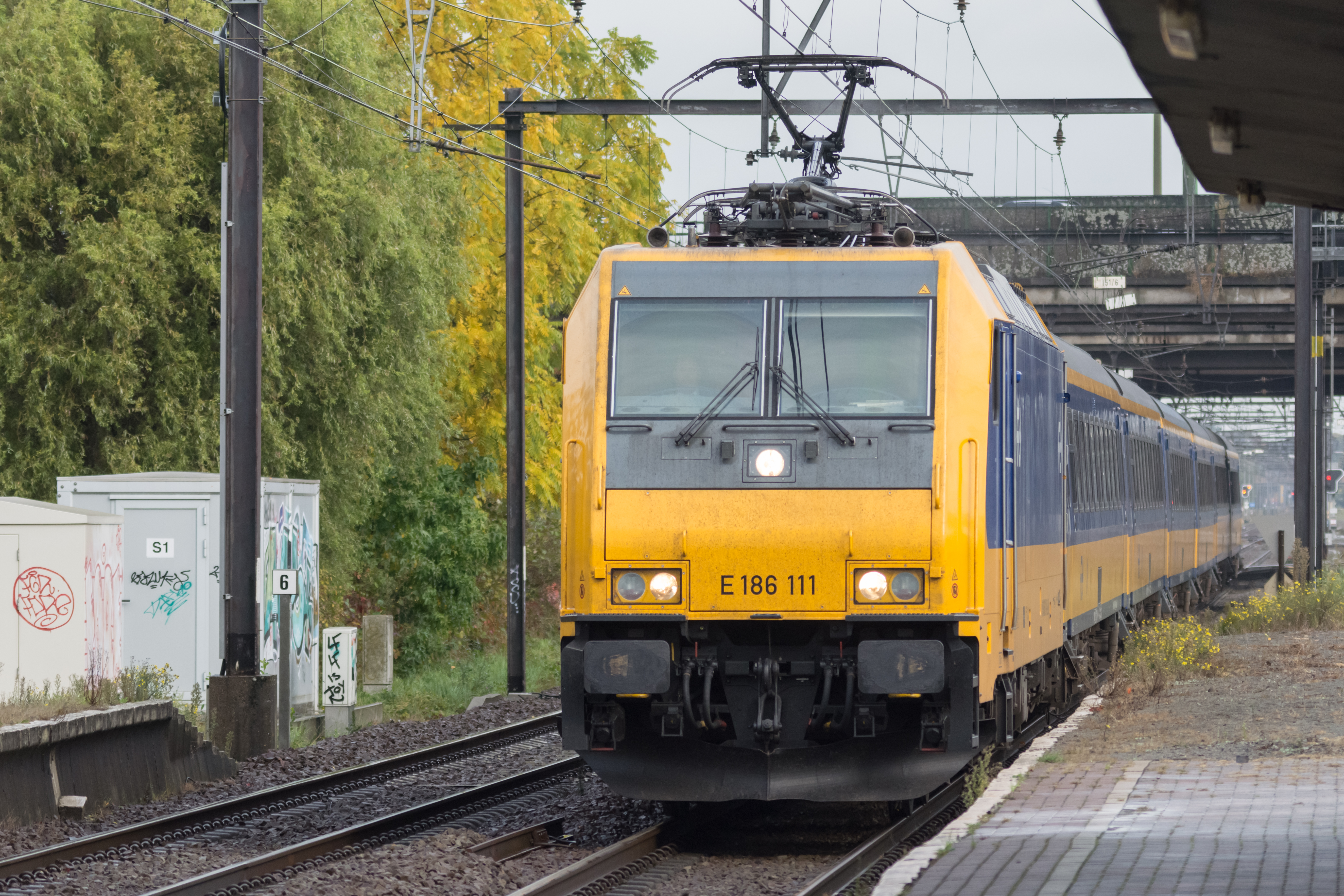 Traxx NS-Voitures NS Bruxelles-Amsterdam Au passage encore d'Anvers-Noorderdokken